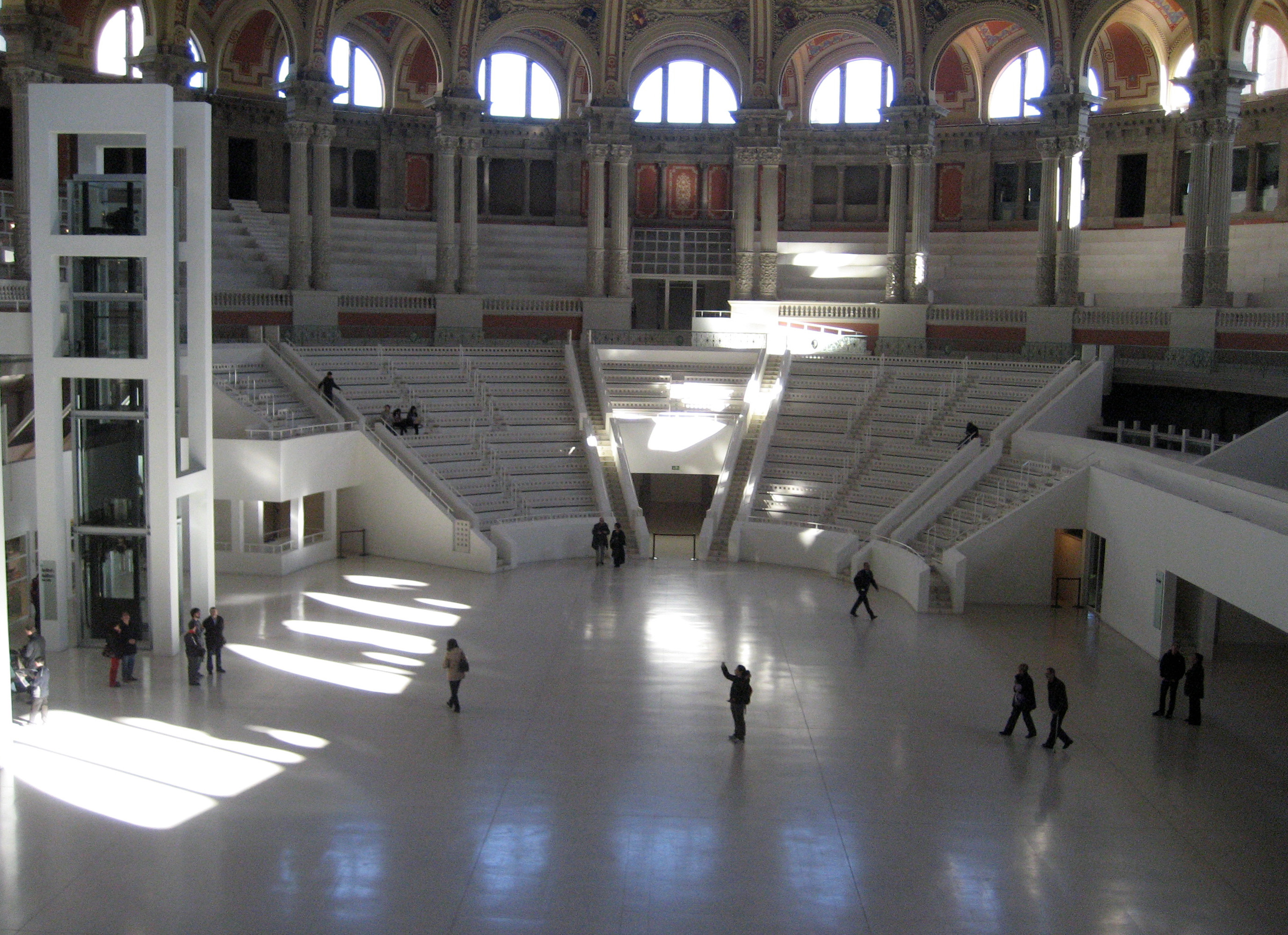 Gran Salón del Palacio Nacional de Barcelona, Cataluña. Spain